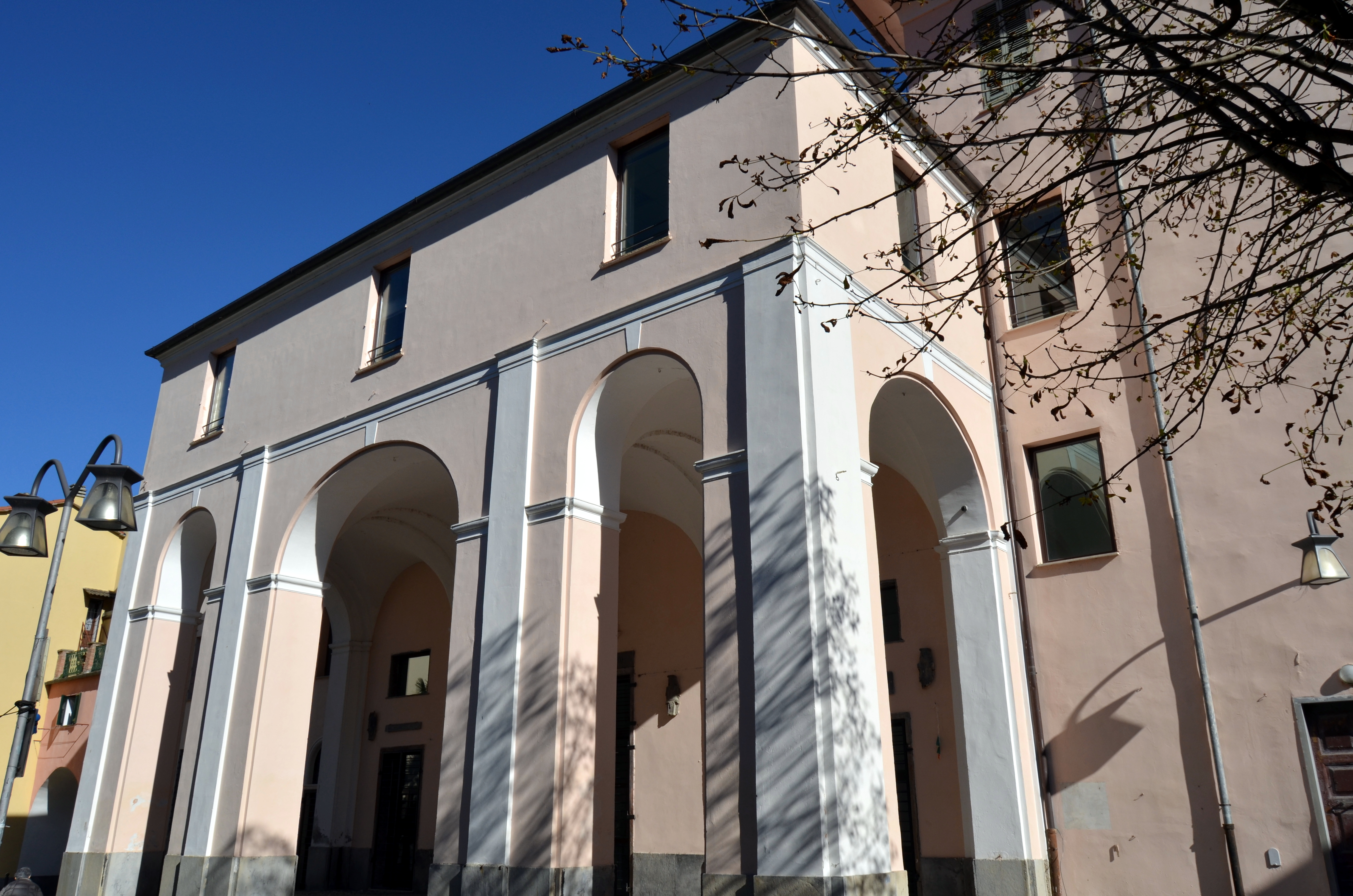 Il teatro civico Rambaldi, ex convento delle Agostiniane, Pieve di Teco, Liguria, Italia